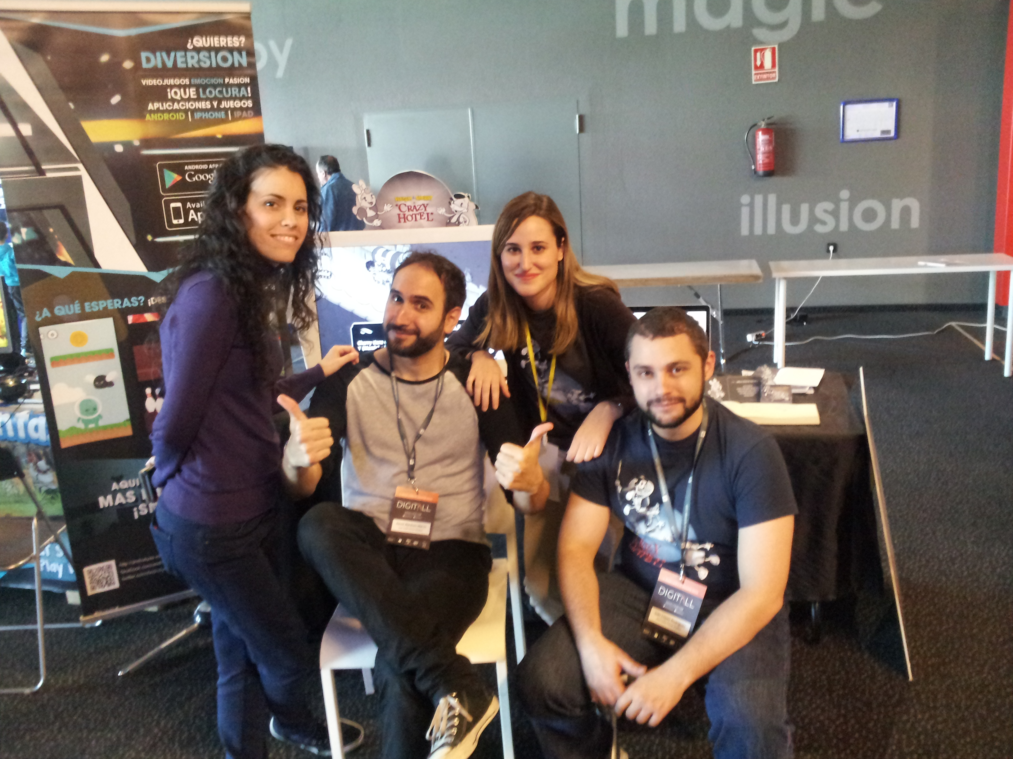 Red Little House Studios a l'stand on presentaven "Fleish and Cherry in Crazy Hotel".